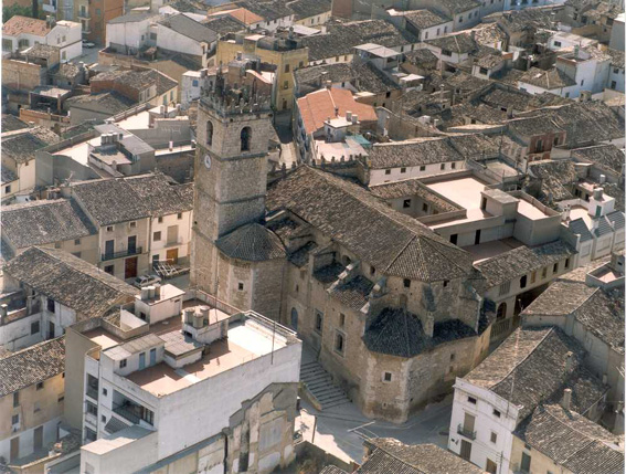 Iglesia de Santa María Magdalena (Ollería)